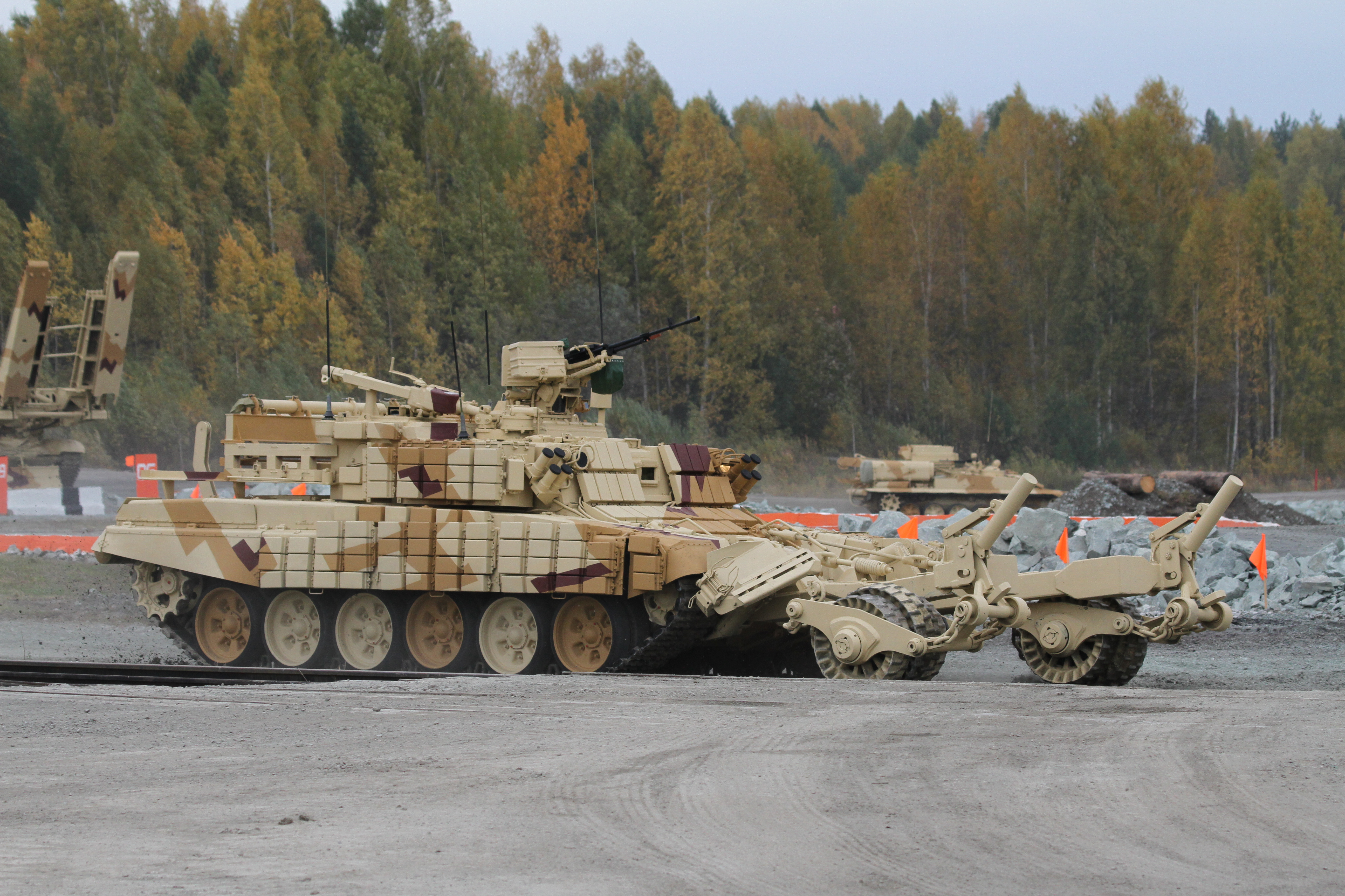 Бронированная машина разминирования БМР-3М (Armored mine-clearing vehicle BMR-3M)